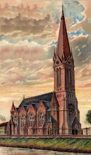 Evangelische Stadtkirche Pforzheim von 1899, 1945 kriegsbeschädigt, 1962 abgerissen